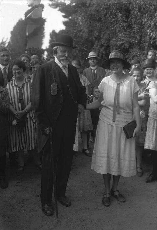 Zum 30. Todestage Otto Lilienthals fand am Denkmal in Lichterfelde eine Kranzniederlegung statt. Der Bruder des Verstorbenen, Gustav Lilienthal, welcher mit seiner Tochter Emmi der Feier beiwohnte.